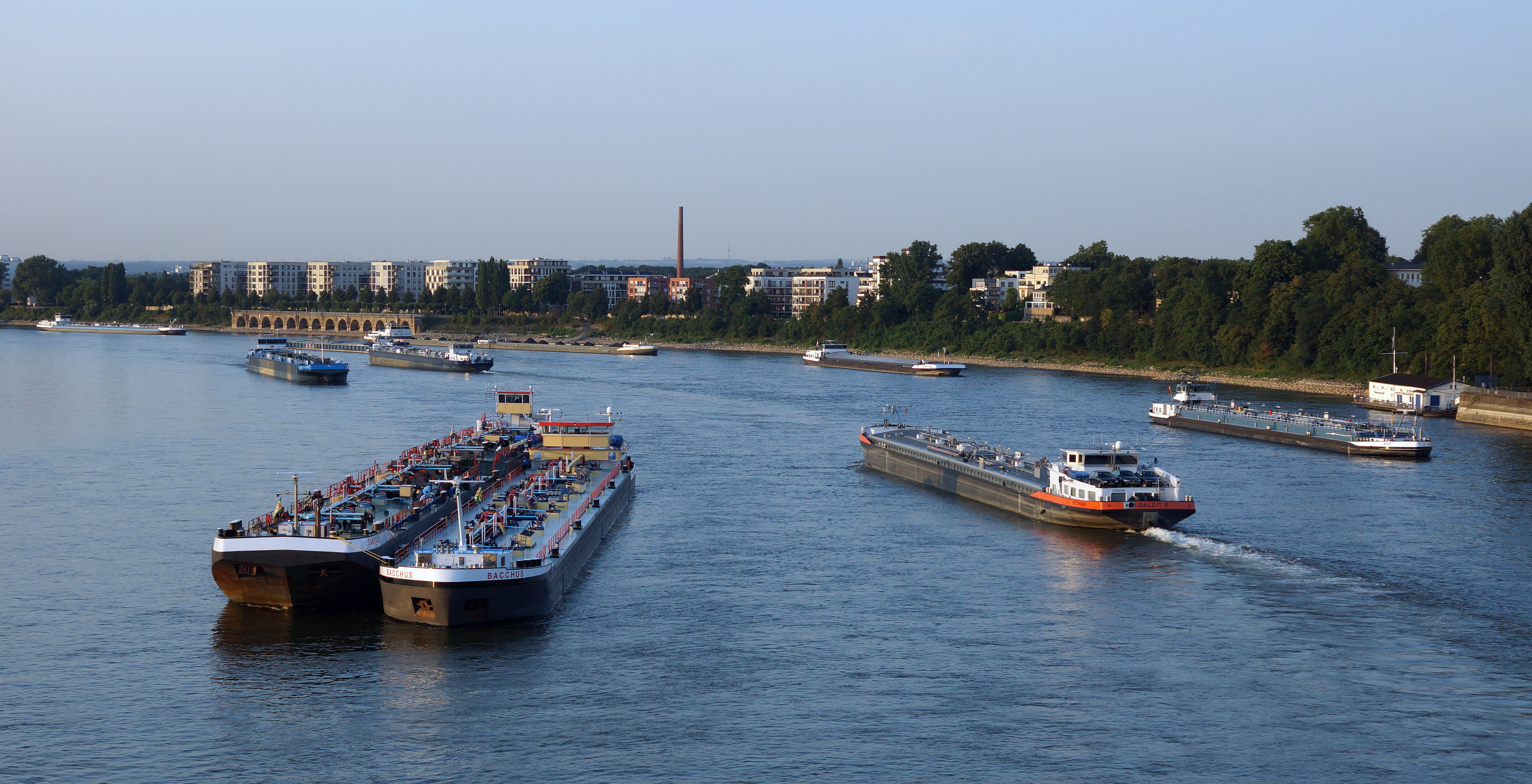 Schiffsstau am 20. August 2013 auf dem Rhein bei Köln. Der Rhein war zu diesem Zeitpunkt infolge einer Havarie an der „Deutzer Platte“ für den Schiffsverkehr gesperrt. Kurz zuvor war die Talfahrt wieder freigegeben worden.